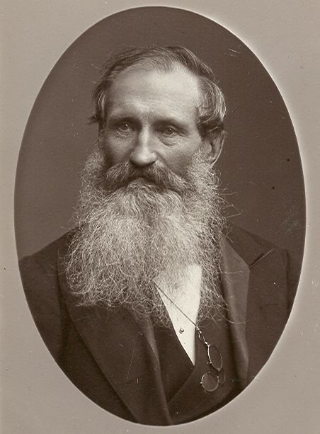 Sir Issac holden à la fin de sa vie